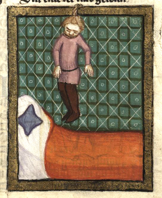 Rudolf von Ems: Weltchronik. Böhmen (Prag), 3. Viertel 14. Jahrhundert. Hochschul- und Landesbibliothek Fulda, Aa 88. Bildbeschreibung nach Martin Roland. Miniatur 173 284r Ahitofel erhängt sich